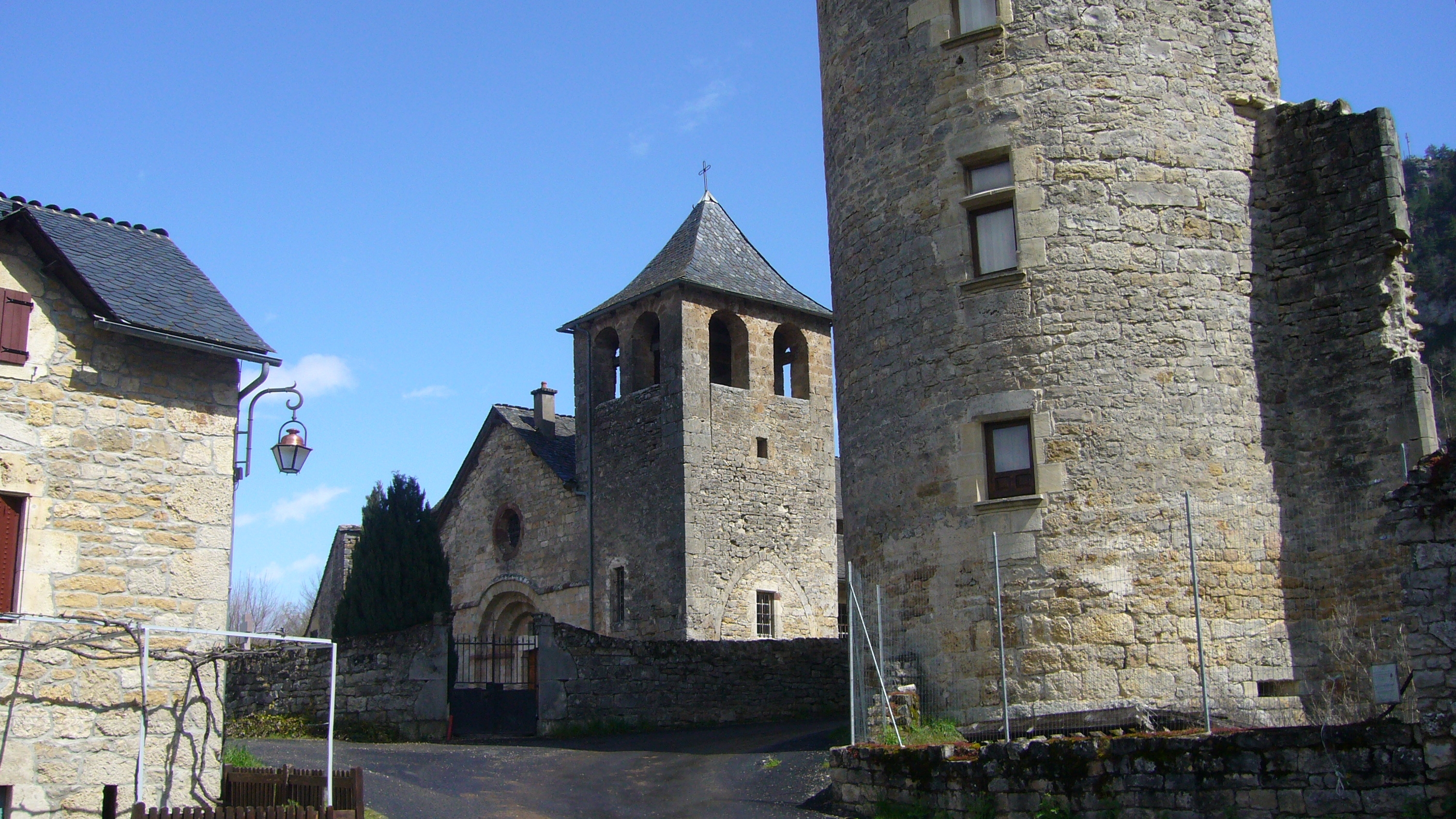 Le village de Saint-Saturnin, Lozère, France .